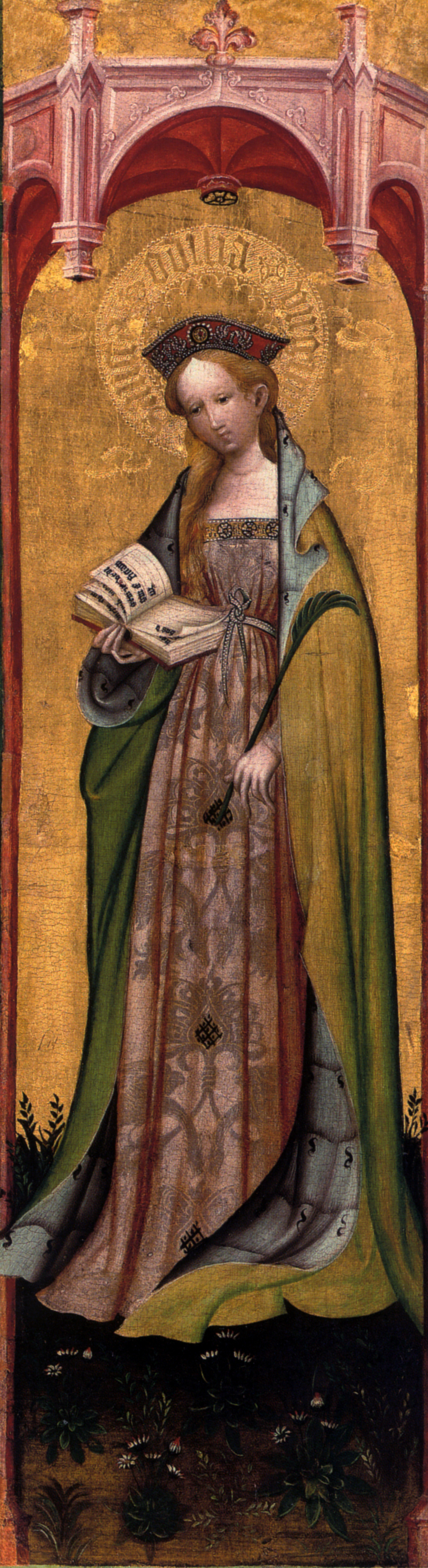 Tafelgemälde Conrad von Soest, um 1420, ursprünglich St. Walburgis in Soest, nach Abriss dieser Kirche 1824 in der Wiesenkirche, seit 1834 in Münster, heute Landesmuseum abgebildet hl. Odilie